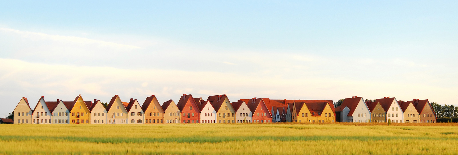 Jakriborg, Hjarup, Sweden